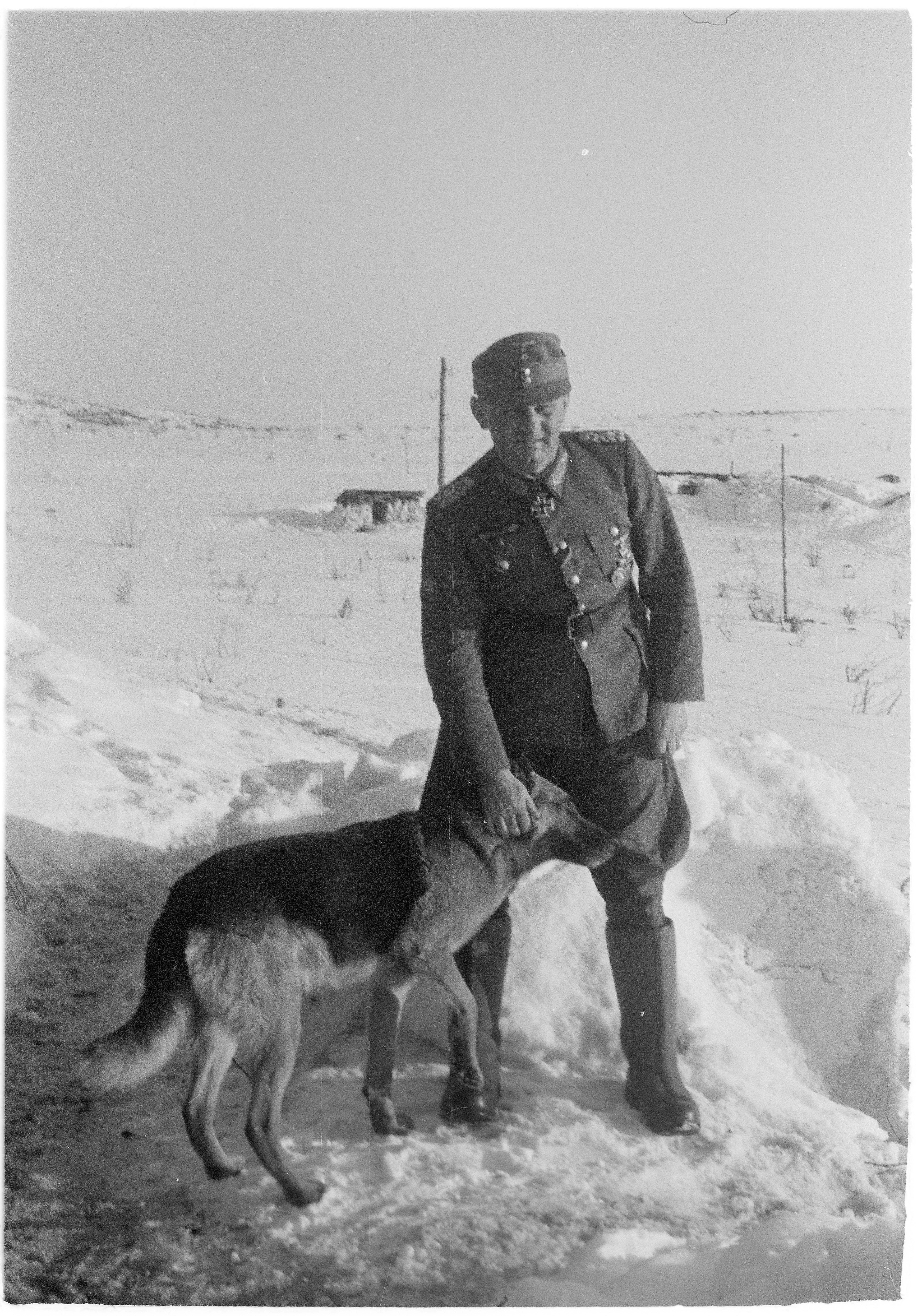 Kenraali Ritter von Hengel. Petsamo